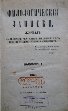 первая страница журнала, 1860